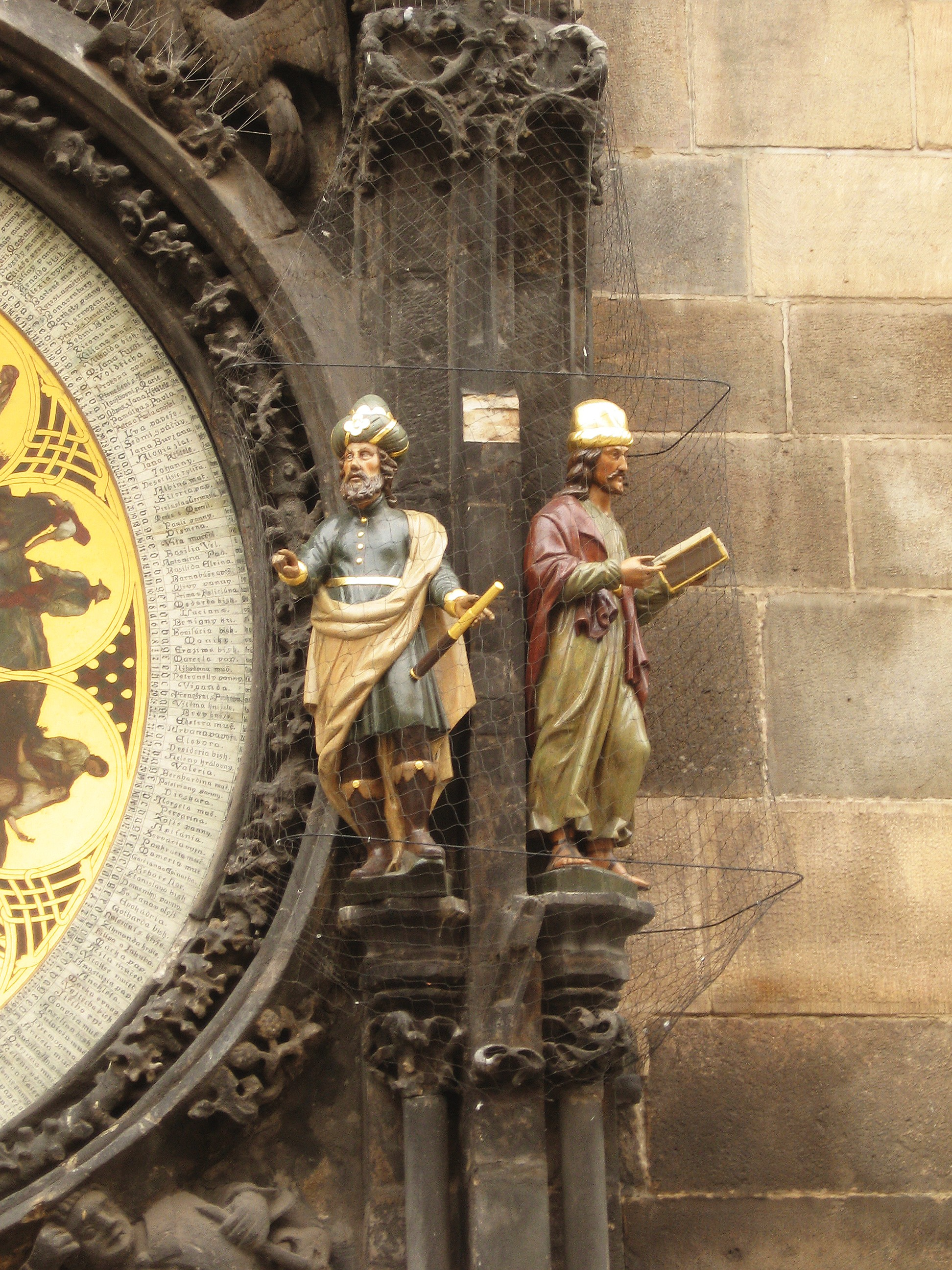 Pražský orloj. Sochy astronoma a kronikáře (s knihou).